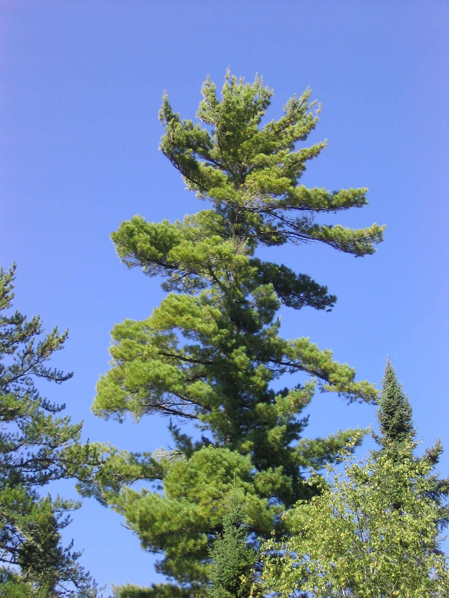 Pinus strobus 3-eheep